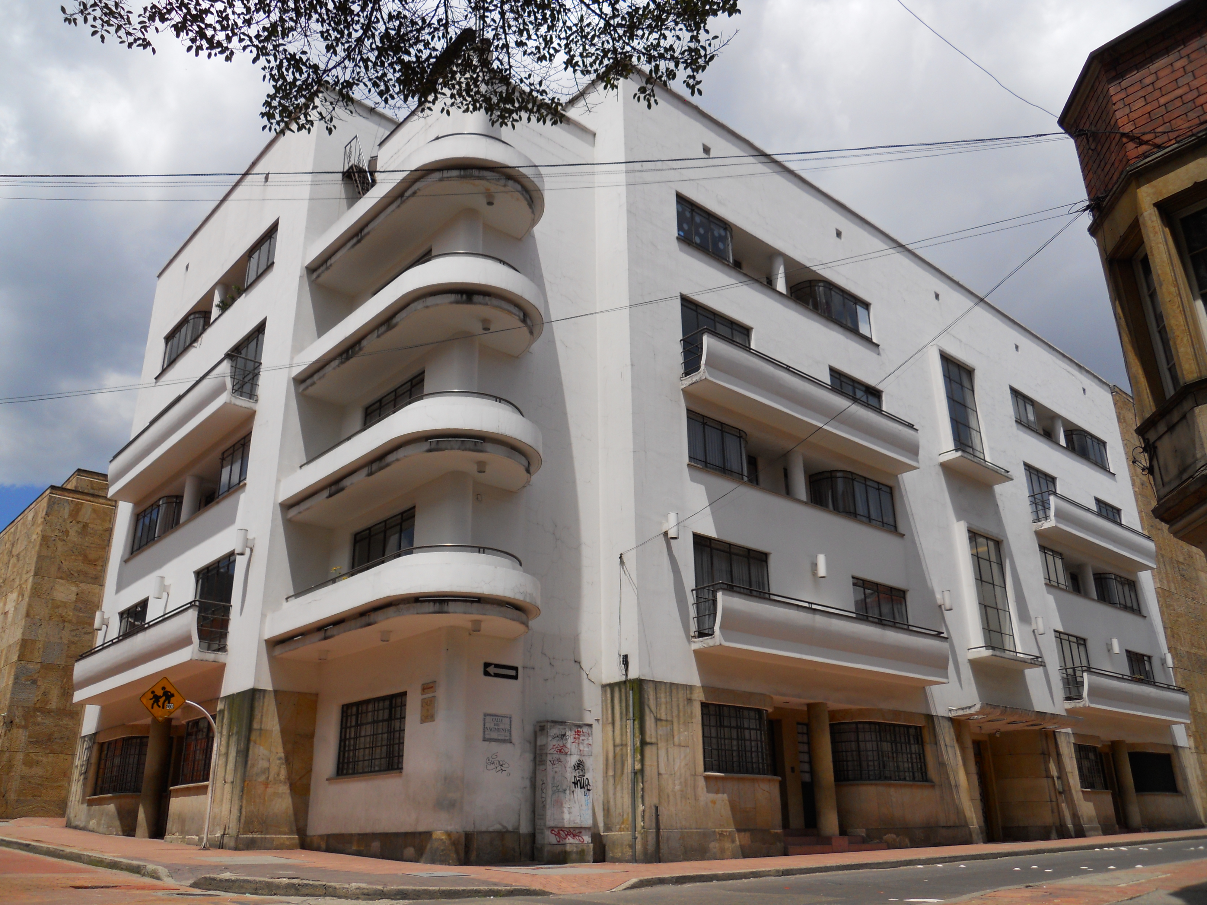 Bogotá edificio Vengoechea.